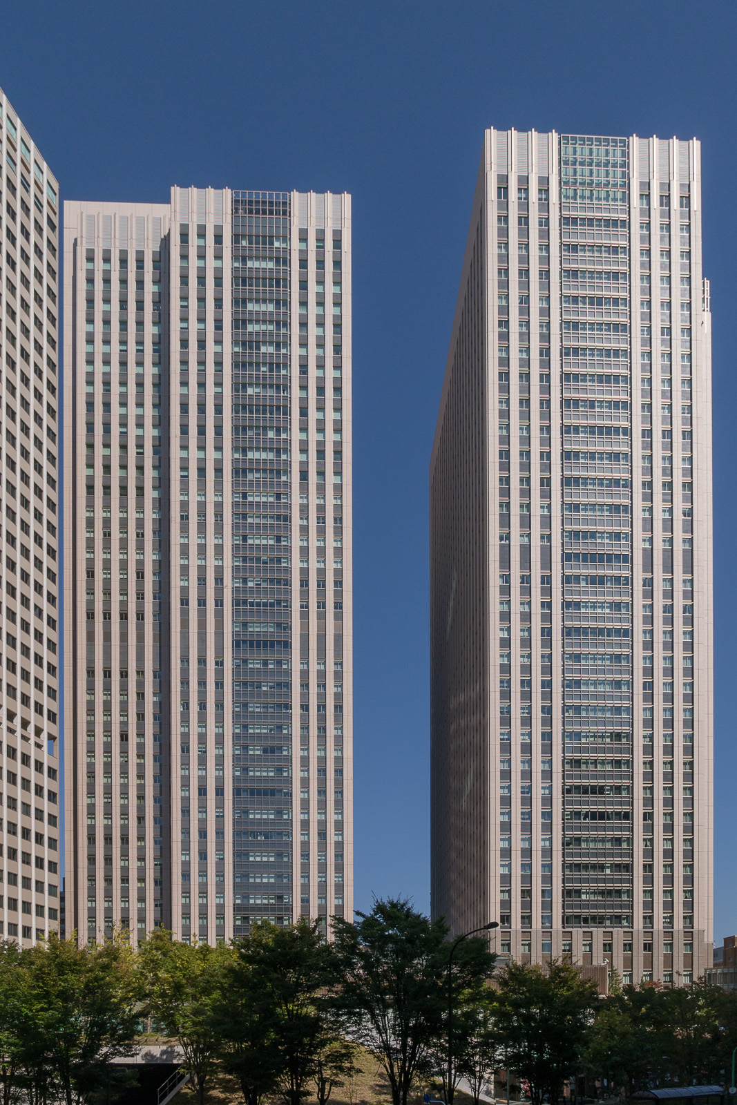 霞が関コモンゲート、文部科学省、金融庁。東京都千代田区霞が関。